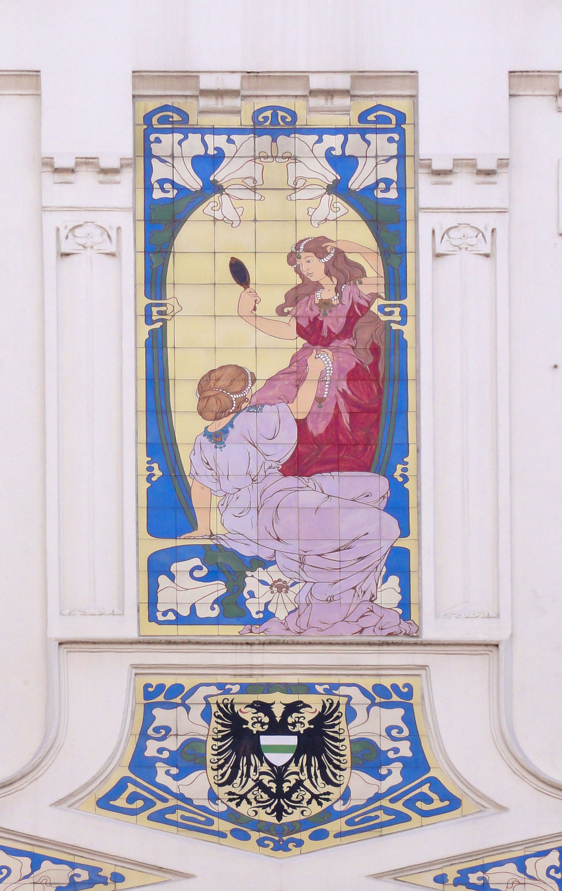 Art nouveau Herenstraat 101 (detail) ontworpen door Antonius Theodorus van Elmpt